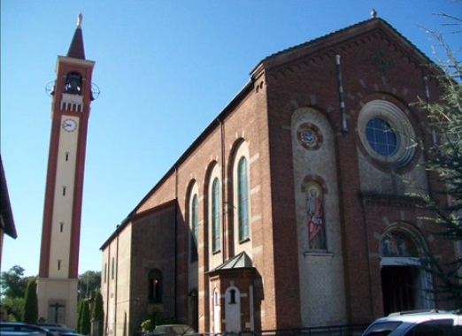 Esterno della chiesa parrocchiale dei Santi Carlo e Luigi - Pontevecchio - Magenta (MI)